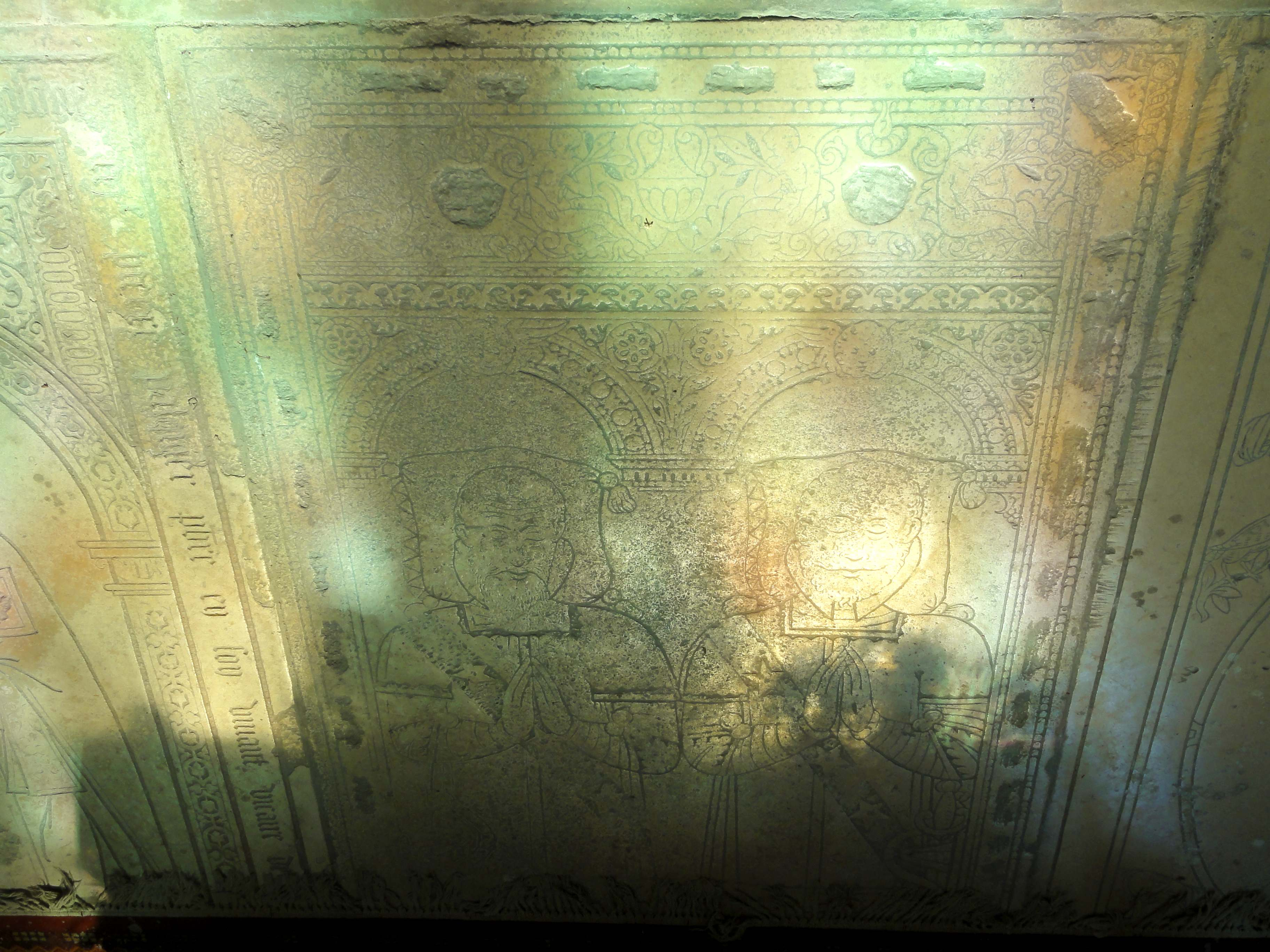 Dalle funéraire à effigies gravées de deux chevaliers, vers 1600.